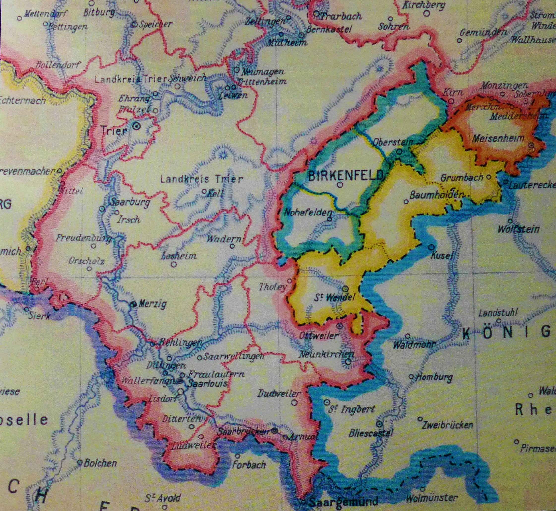 Die Region des heutigen Saarlandes nach dem Wiener Kongress: Preußische Rheinprovinz in Rosa, Bayerischer Rhreinkreis in Blau, Fürstentum Lichtenberg des Herzogtums Sachsen-Coburg-Gotha in Gelb, Herrschaft Meisenheim der Landgrafschaft Hessen-Homburg in Orange, Fürstentum Birkenfeld des Großherzogtums Oldenburg in Grün, Großherzogtum Luxemburg (links), Königreich Frankreich (links unten)